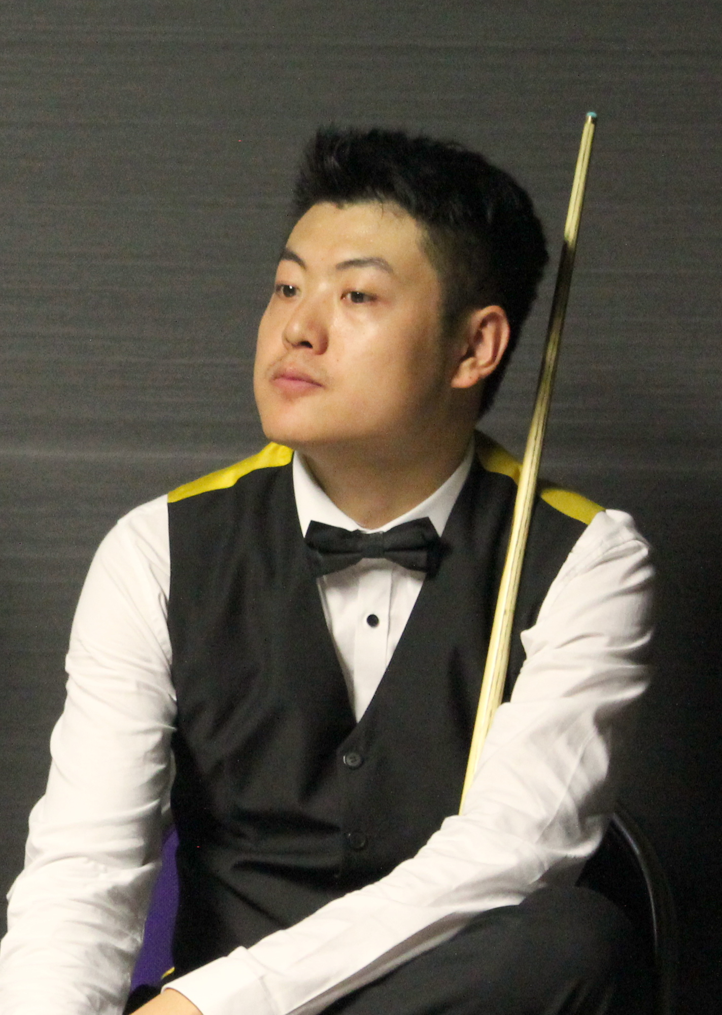 Liang Wenbo beim Paul Hunter Classic 2016